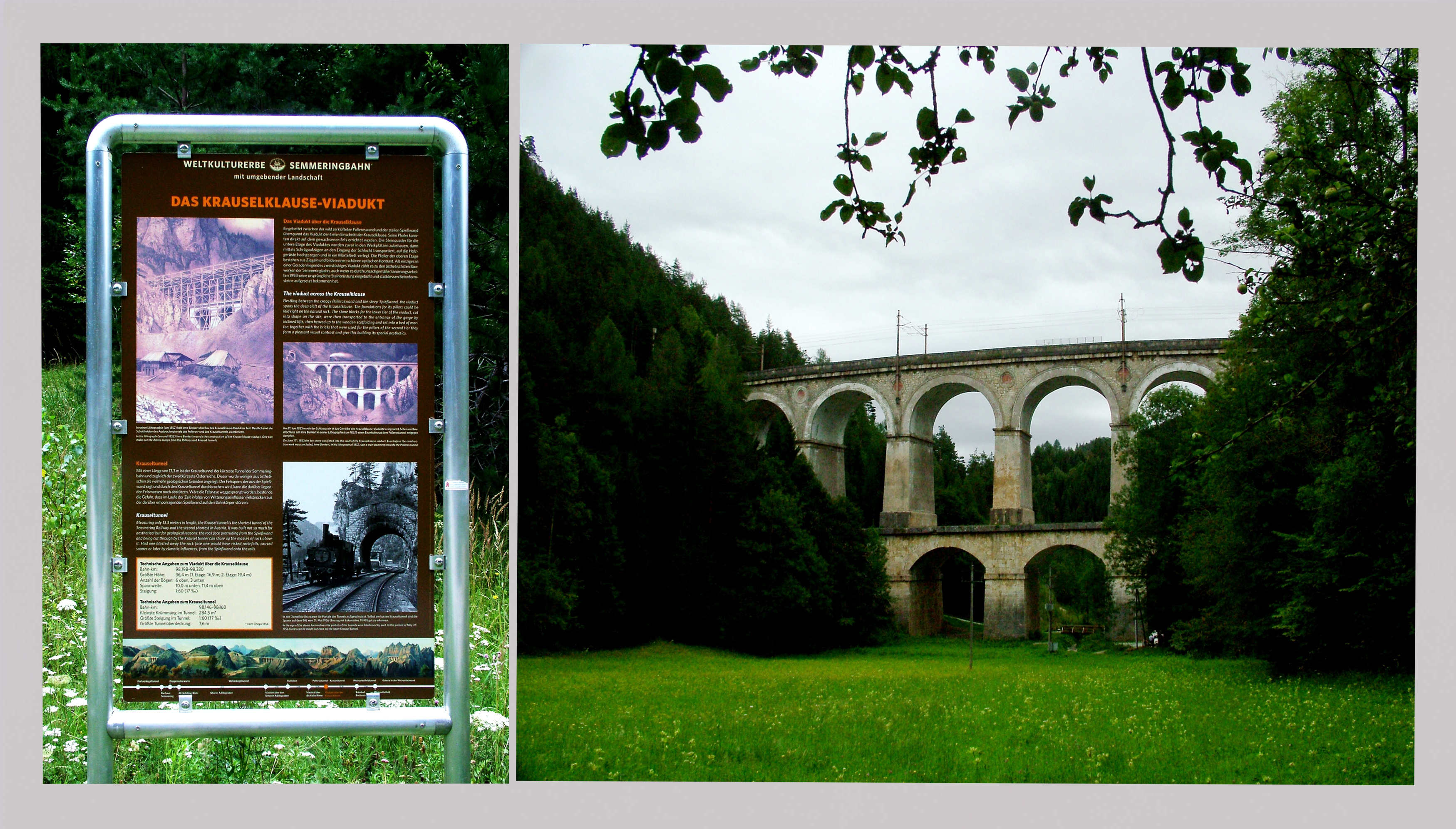 Ausztria: Semmeringbahn, Krausel-Klause-Viadukt